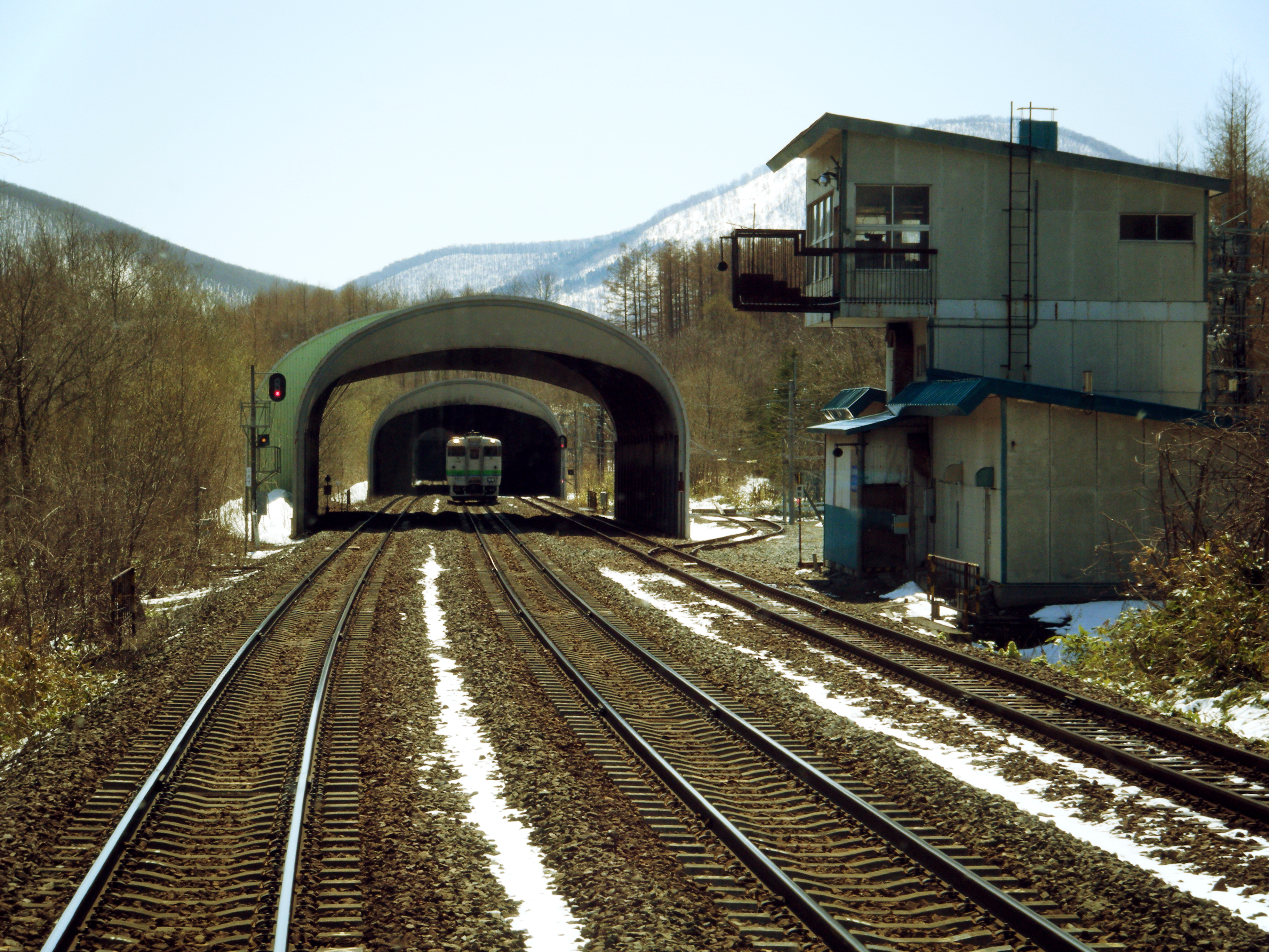 広内信号場全景（JR北海道 石勝線）。普通列車車内より撮影。